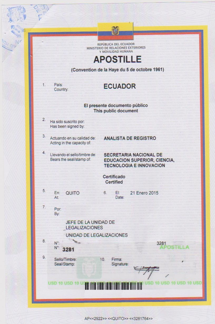 Apostilla de la Haya, dada en El Ecuador